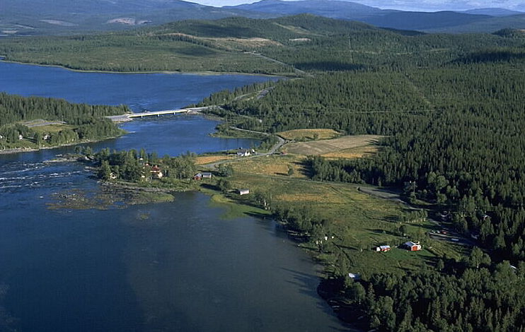 Skalstuguvägen Motiv: Bodsjöedet Nyckelord: Flygbilder, Riksintressen Kategori: Insjömiljöer Skalstuguvägen.